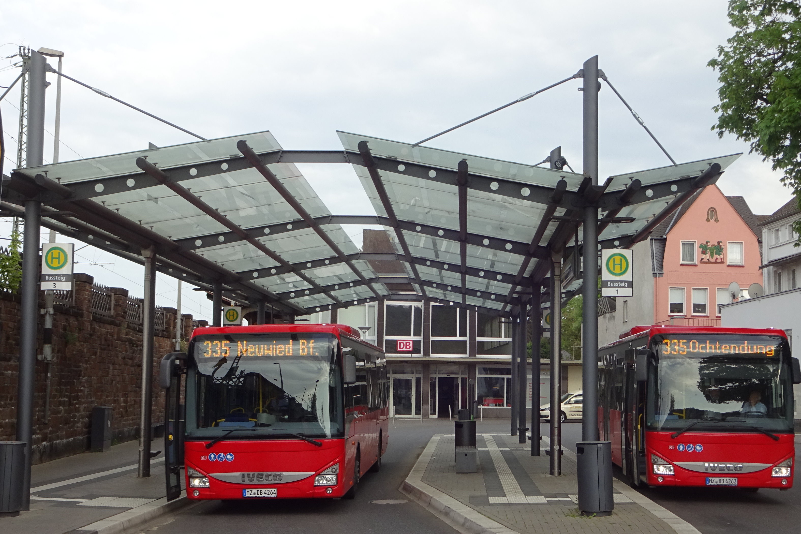 Bahnhofsvorplatz Andernach mit zwei Bahnbussen